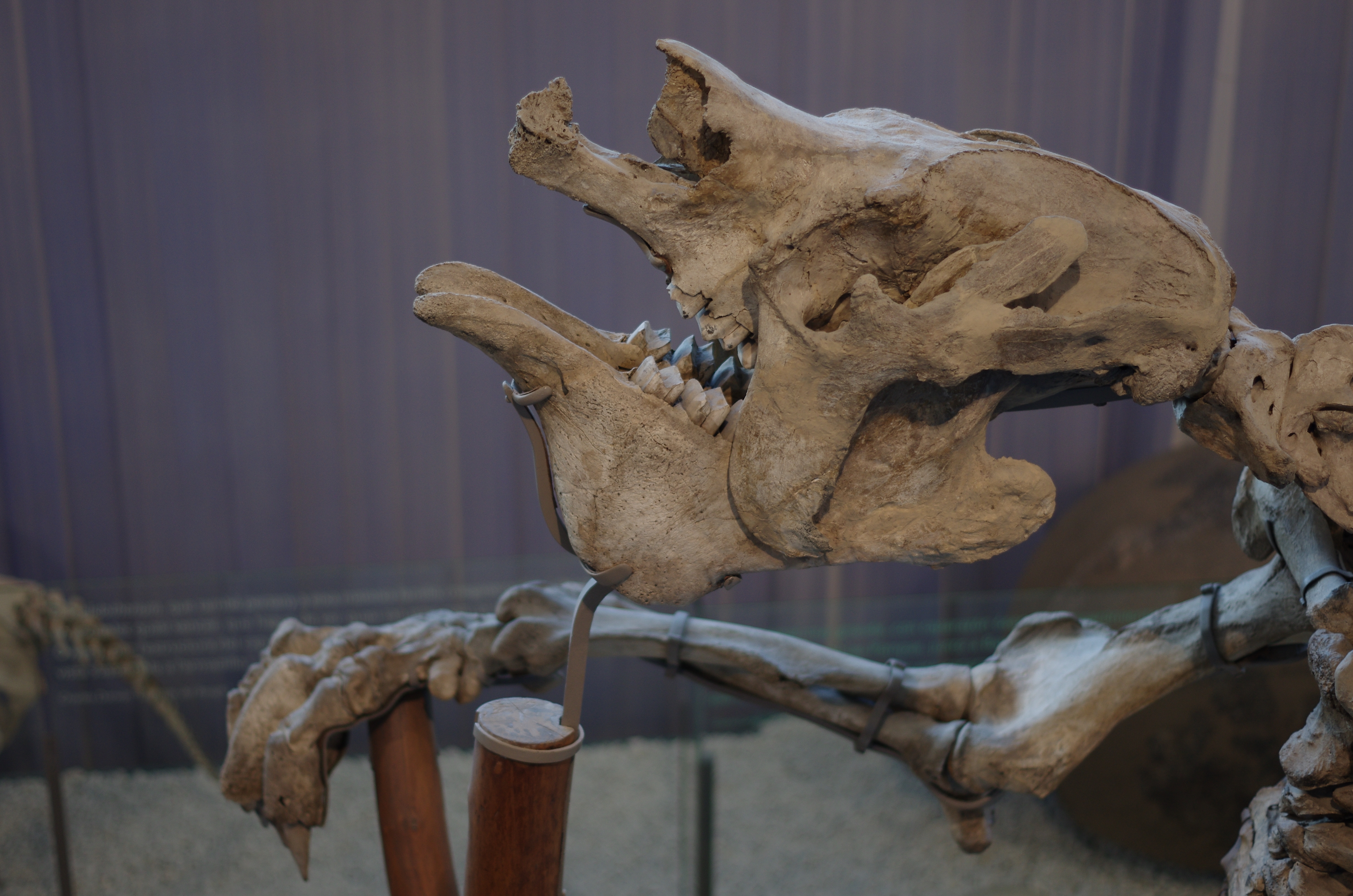 Detalle del cráneo del megaterio del Museo de Ciencias Naturales de Valencia